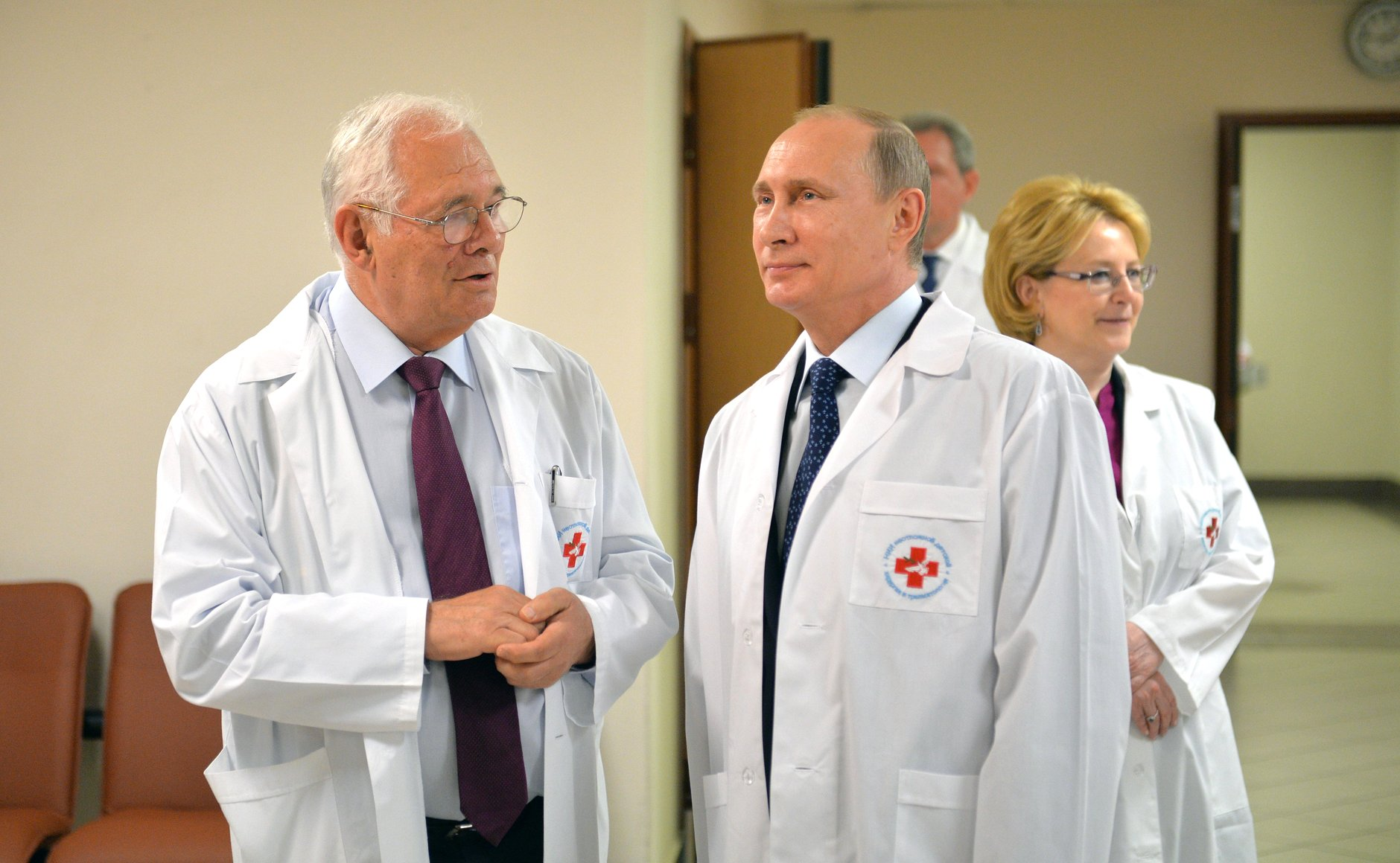 Во время посещения Научно-исследовательского института неотложной детской хирургии и травматологии. С директором НИИ Леонидом Рошалем